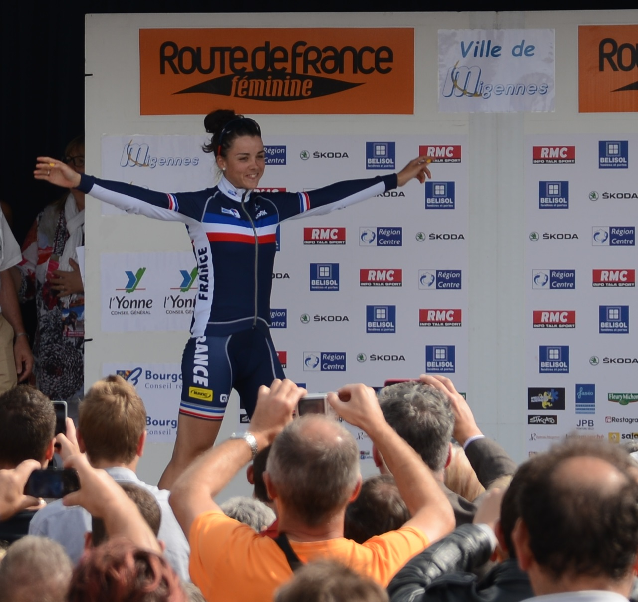 Cycliste professionnel